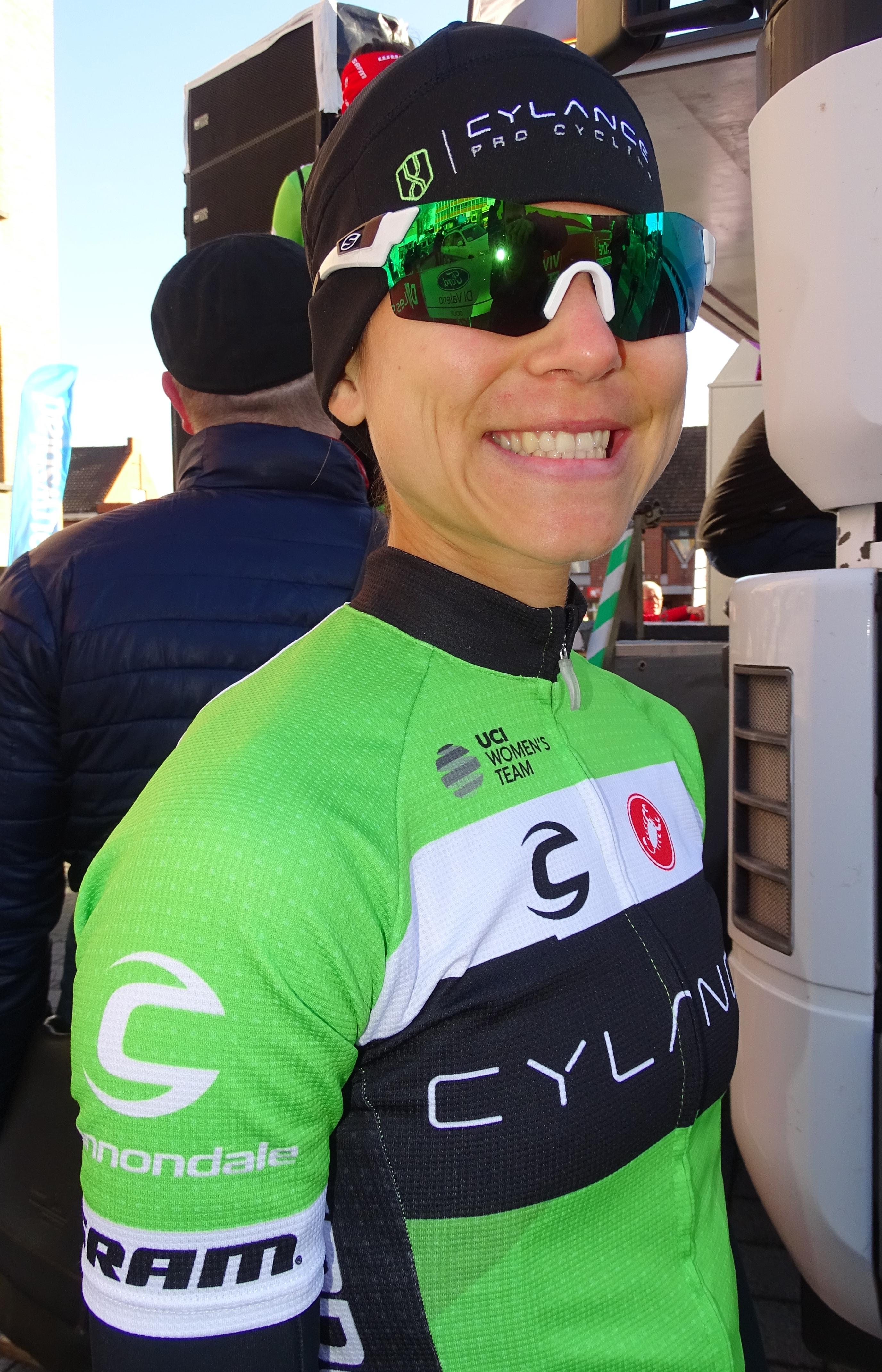 Reportage réalisé le mercredi 2 mars à l'occasion du départ du Samyn des Dames 2016 et du Samyn 2016 à Quaregnon, Belgique.